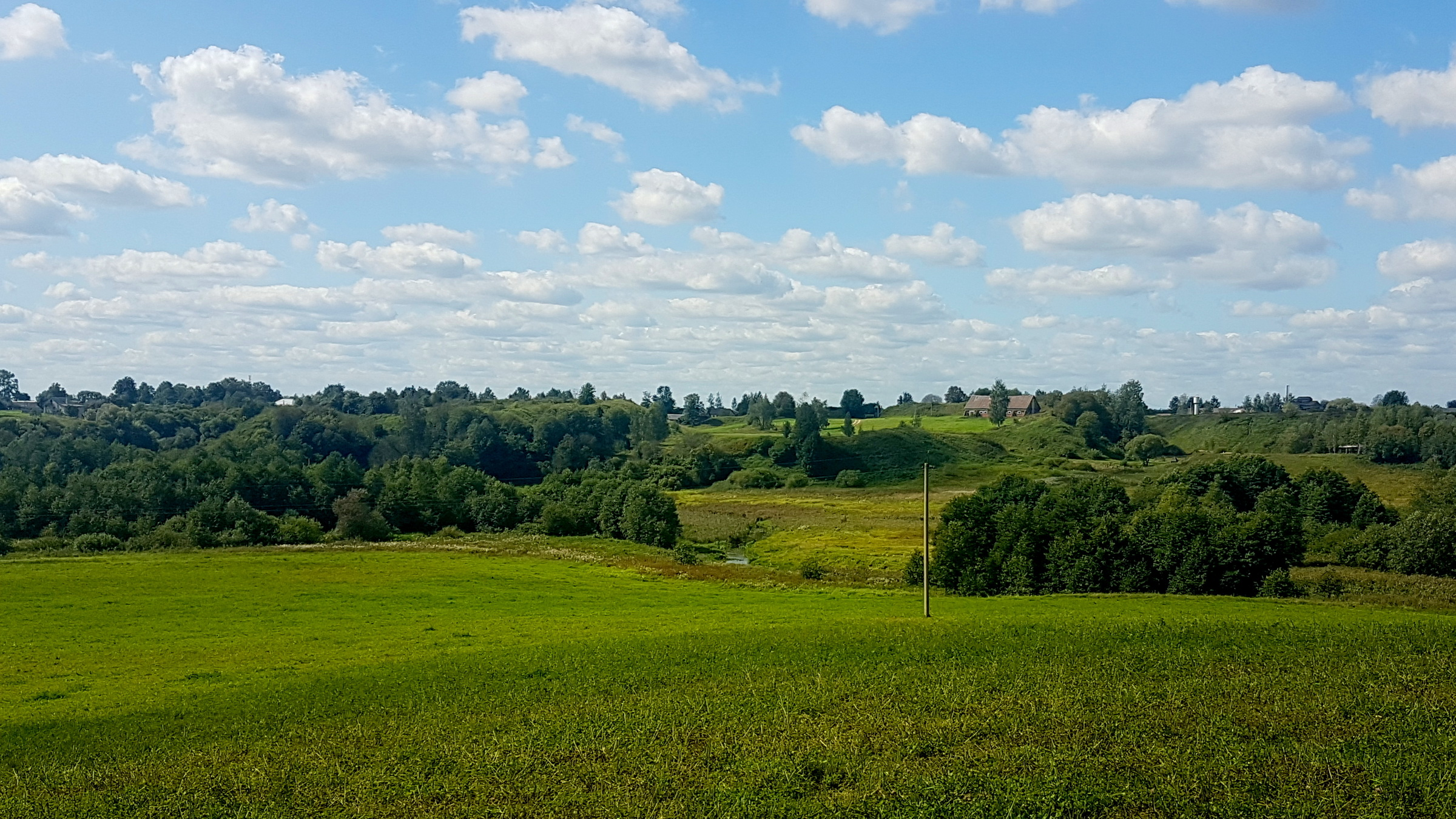 Вид на Друцкое городище с левого берега р. Друти